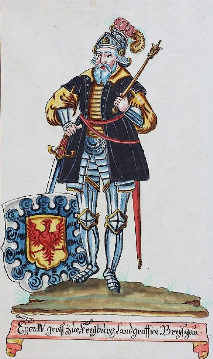 Egon III. Graf von Freiburg; die zählweise der Egone ist unterschiedlich je nach dem ab wann die Uracher Egone als Freiburger gezählt werden; in der Quelle wird dieser Egon als der IV. genannt; bei Kindler von Knobloch als II.; aus dem Kontext der Quelle wird klar, dass hier der in Wikipedia als Egon III. bezeichnete gemeint ist